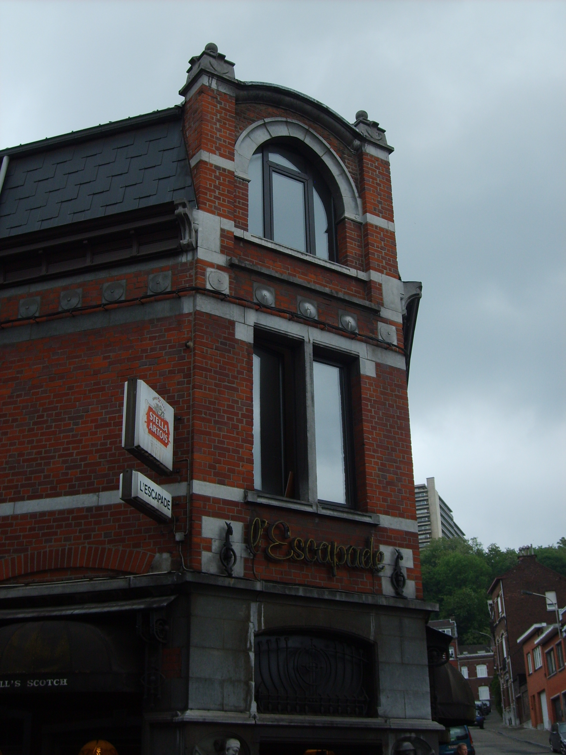 Maison Moonen Liège rue du Laveu, 28 Art nouveau arch. Victor Rogister, 1903